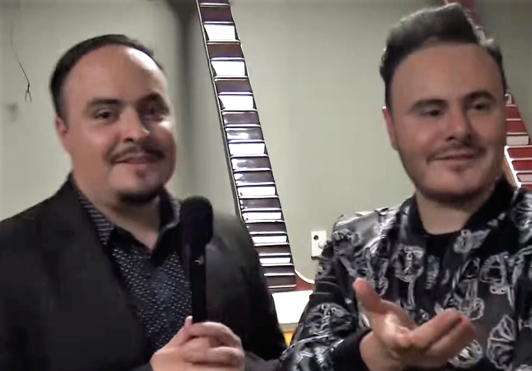 Rio Roma y CNCO le cantan a sus princesas, y revelan anécdotas de CNCO by Dulce Osuna